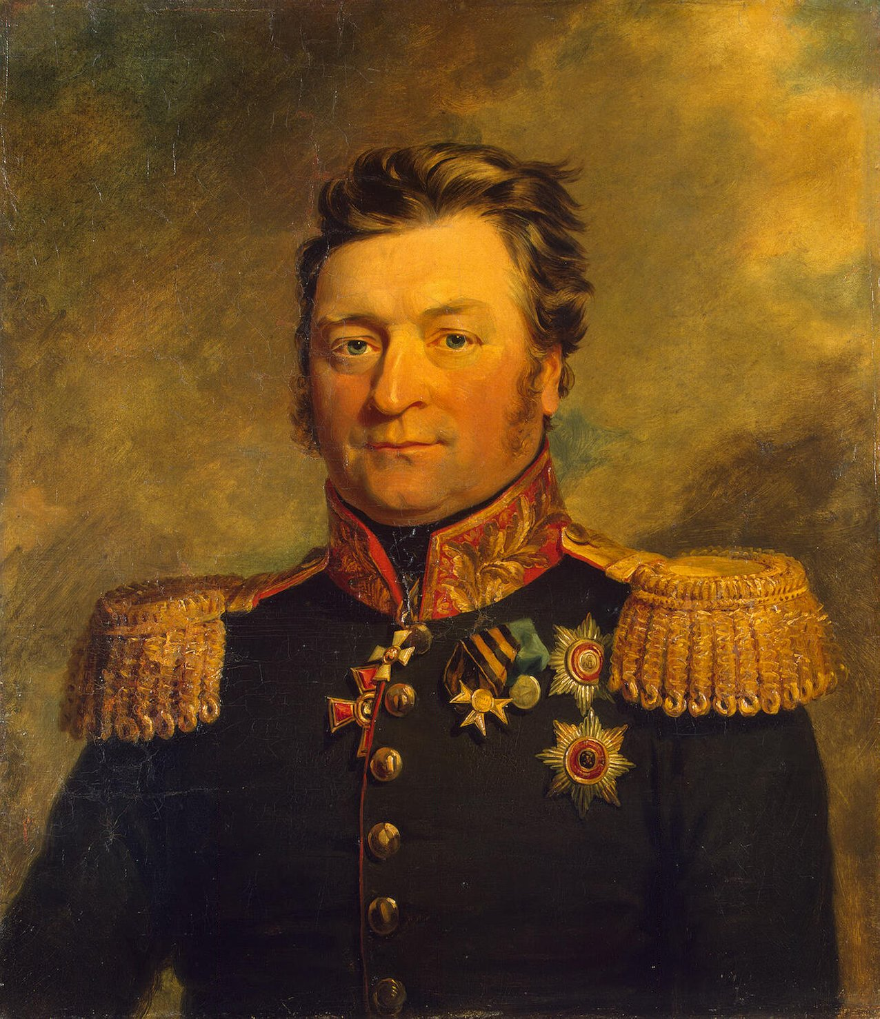 Alexandr Lvovich Voinov (1770 – 1832) russian general